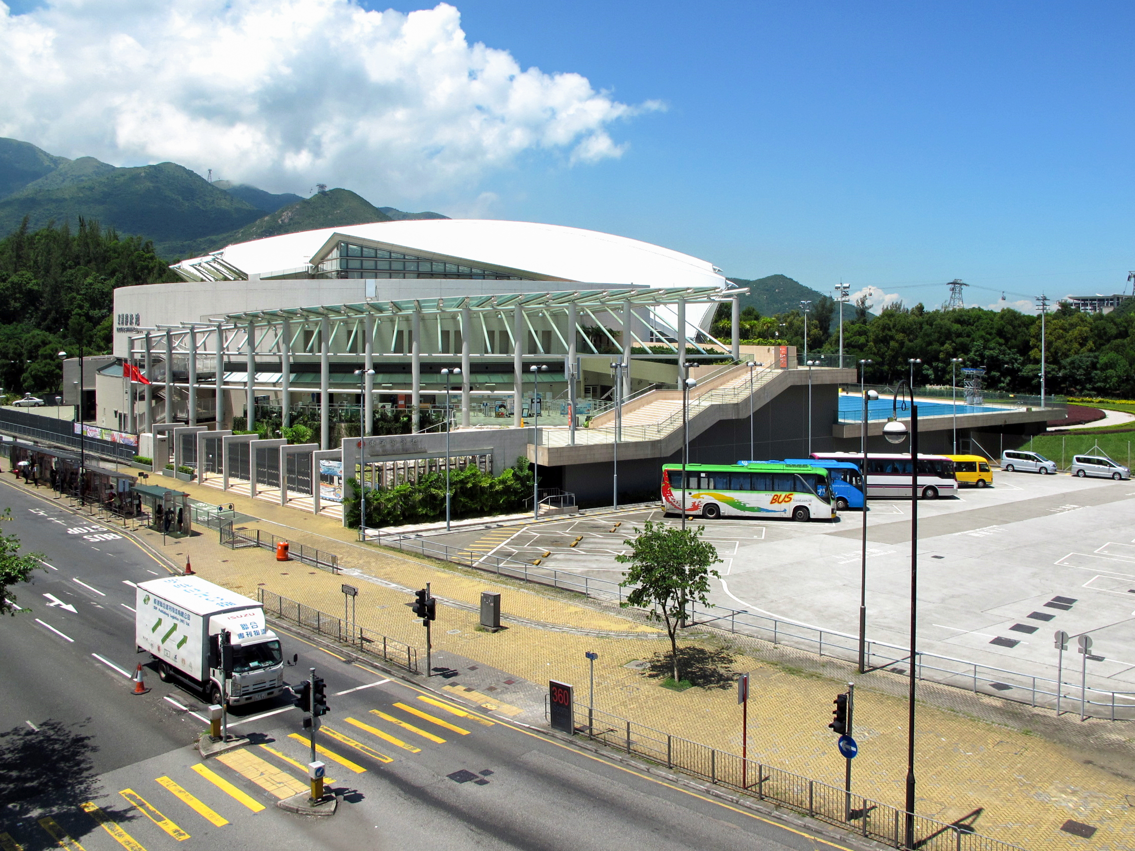 Tung Chung Swimming Pool